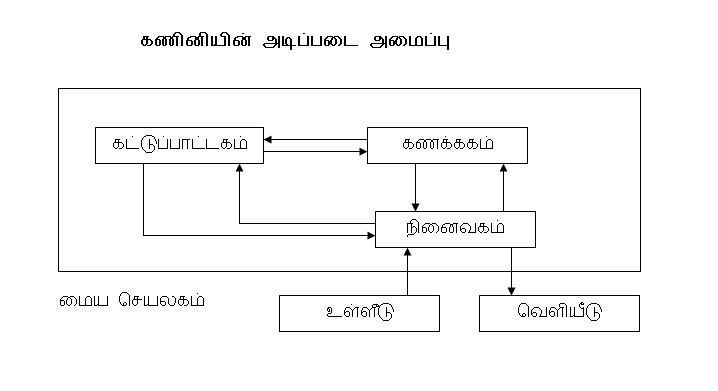 Public Domain; I created it using Word. பகுப்பு:தமிழில் விளக்க வரைபடங்கள்